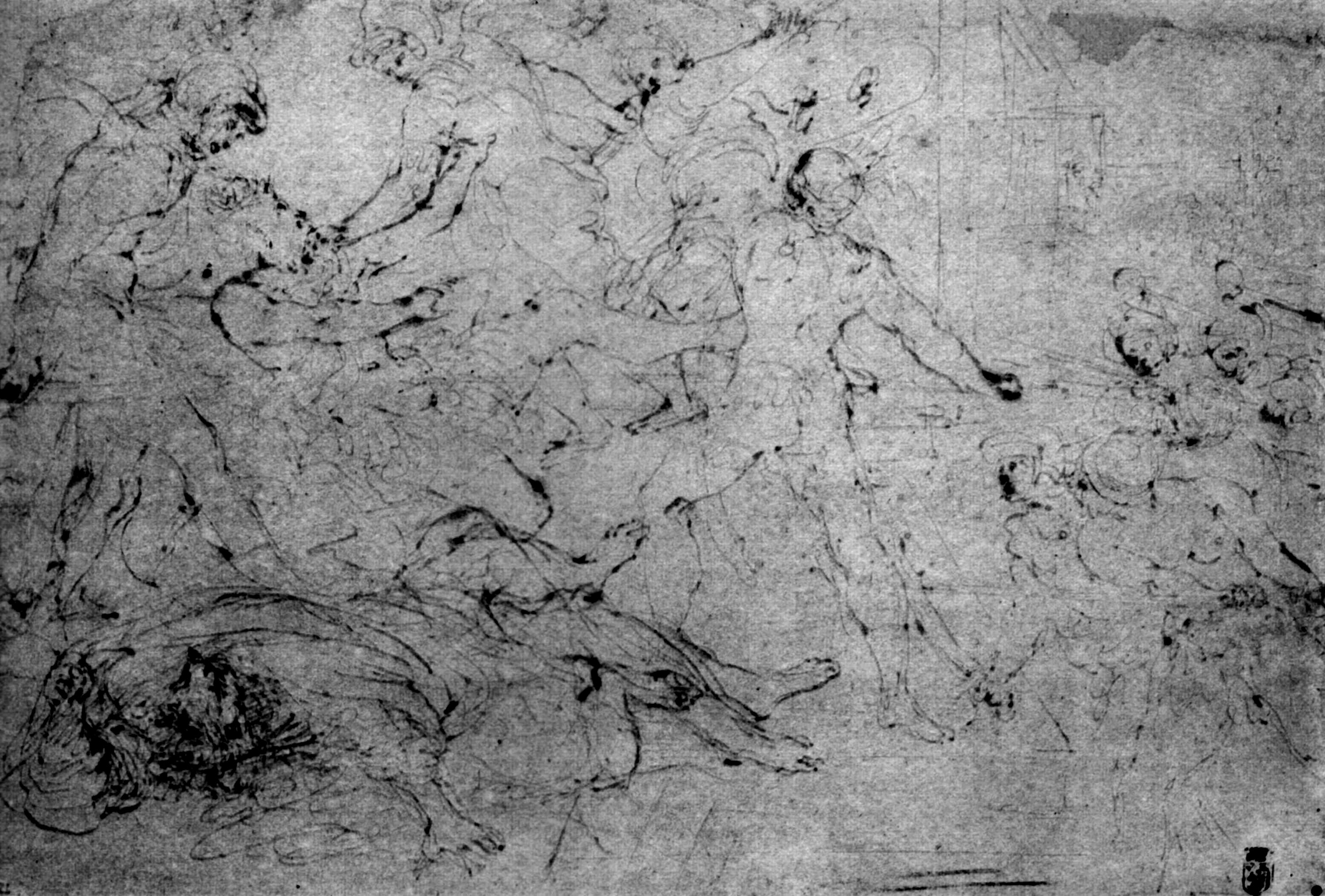 study